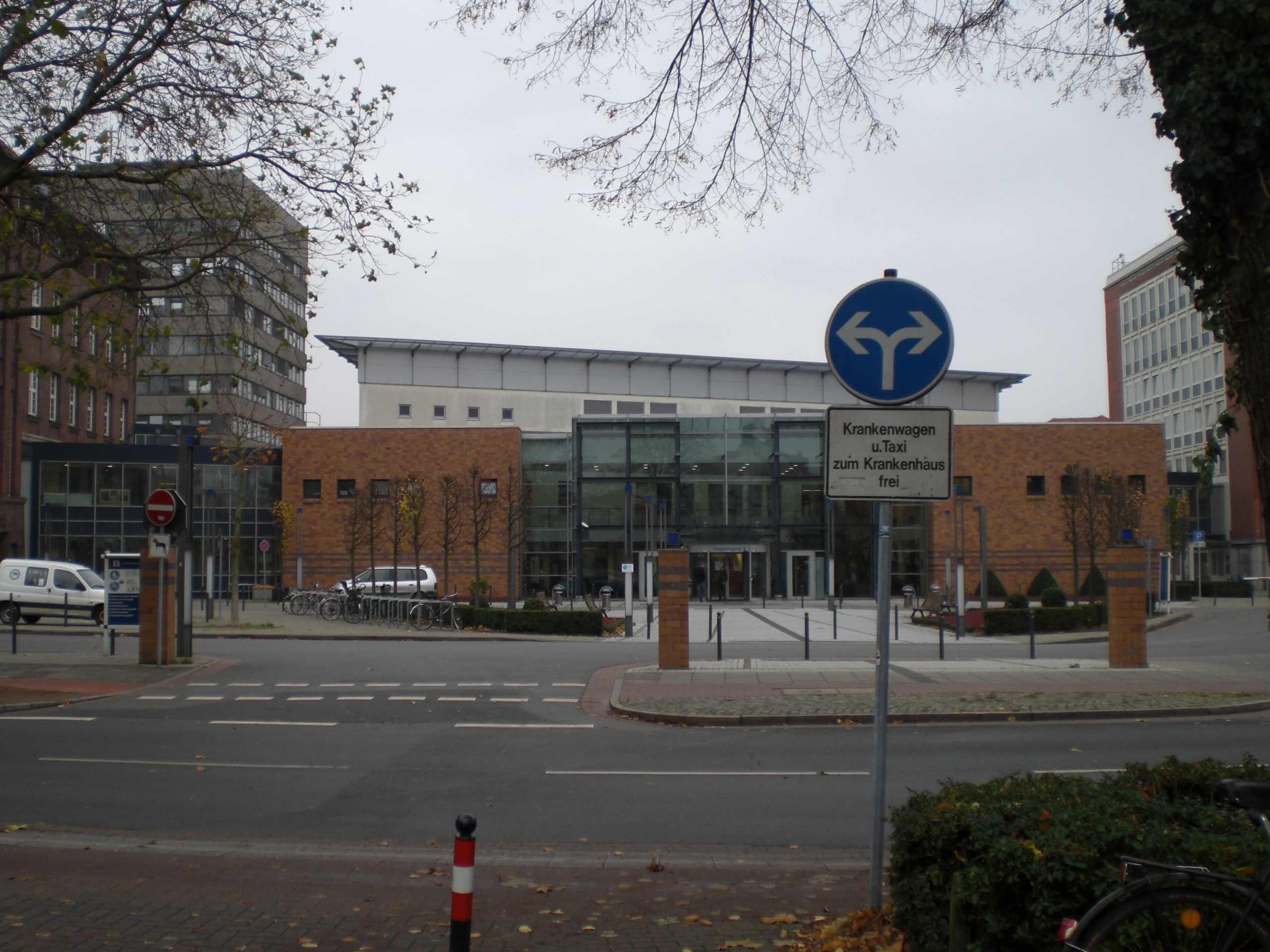 Klinikum Bremen-Mitte, Haupteingang